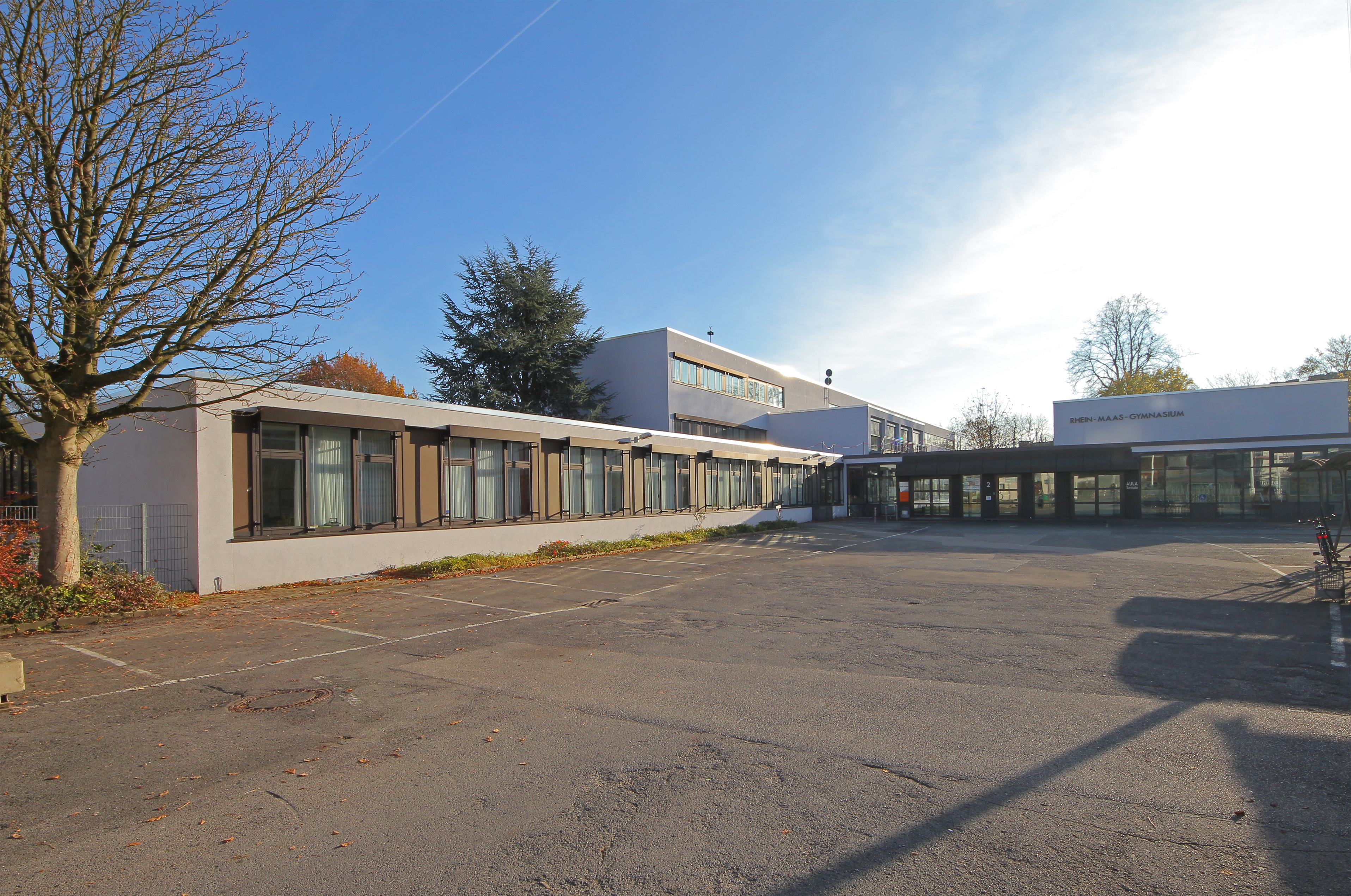 Rhein-Maas-Gymnasium in der Rhein-Maas-Straße, Aachen, NRW